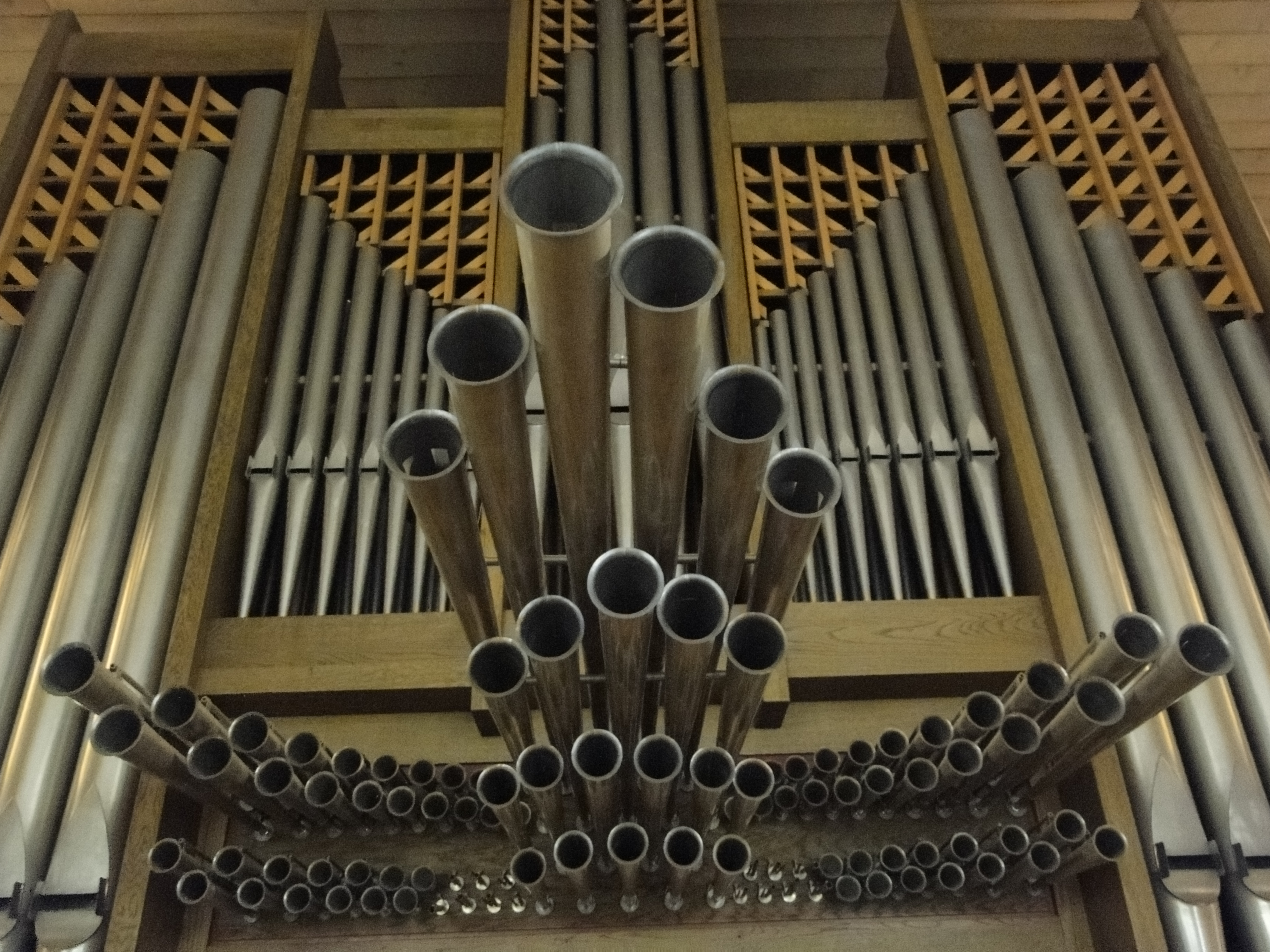 Spanische Trompeten der Wilbrand Orgel in der Basilika zu Seligenstadt a.M.